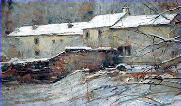 Jean-Pierre Beckius: D'Lärensmillen.